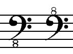 F кључ 02